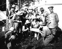 Cкауты в лагере